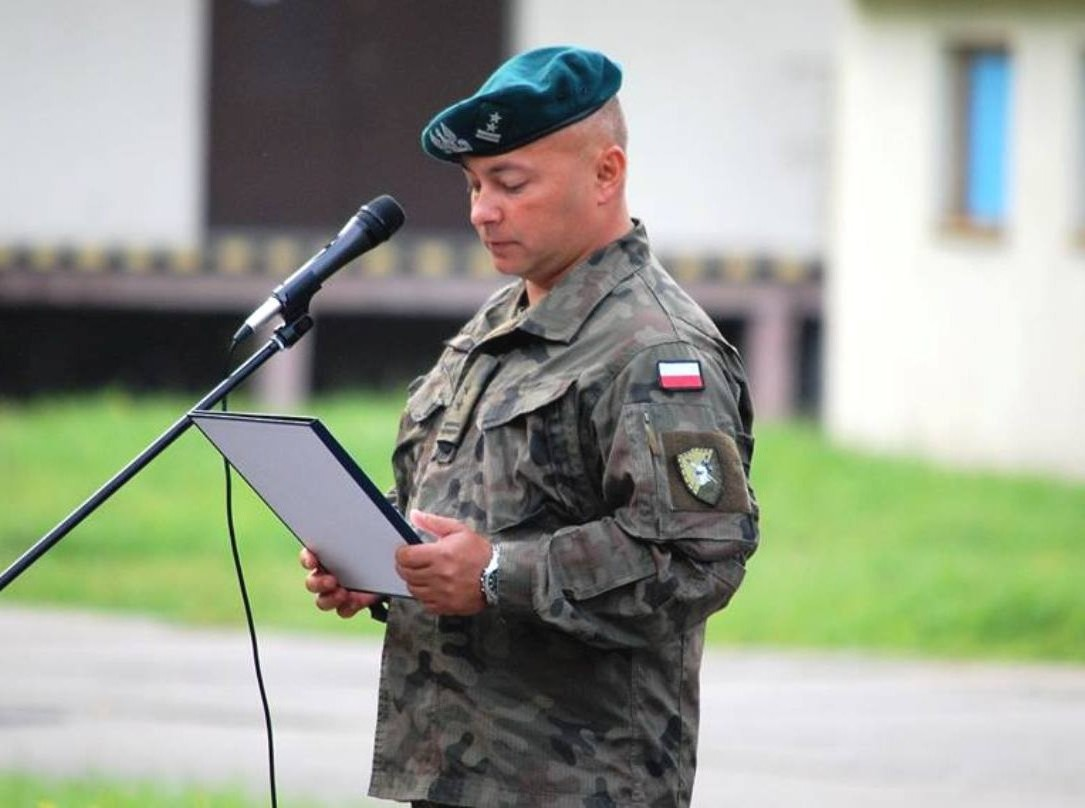 Ppłk Rafał Jędro